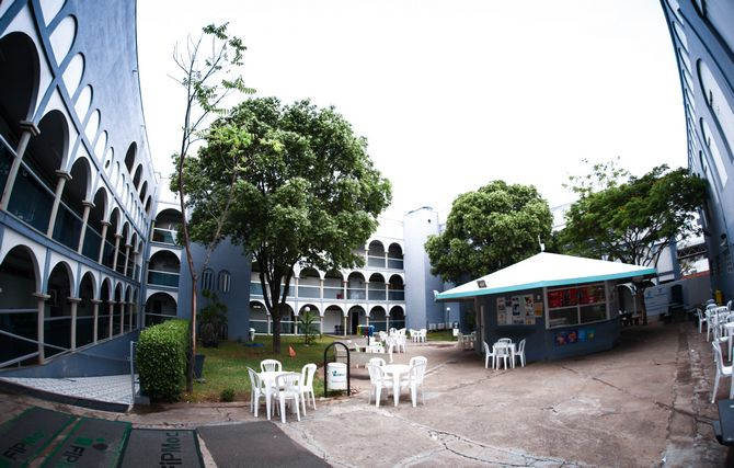 UniFIPMOC